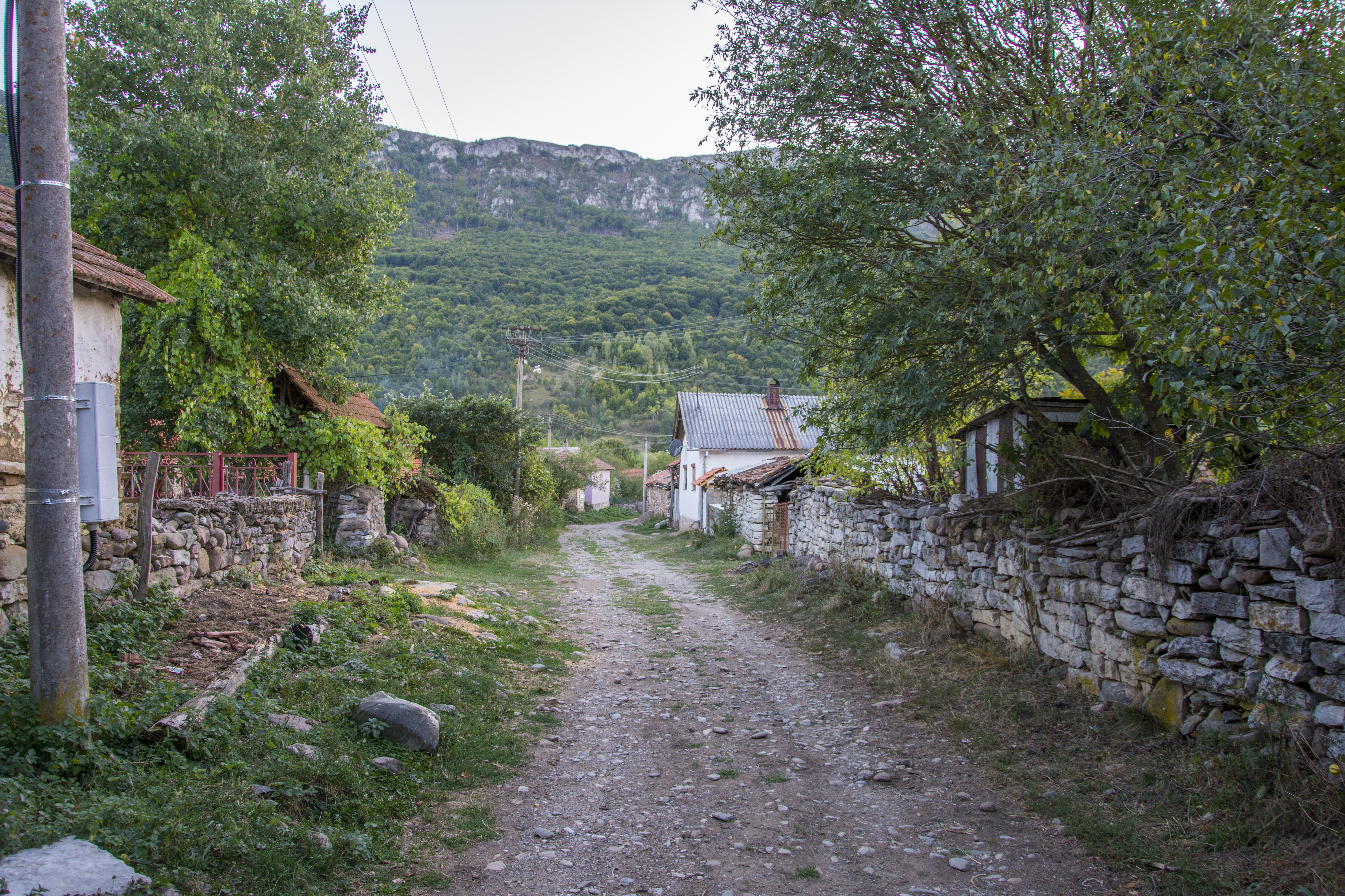 Славиња село